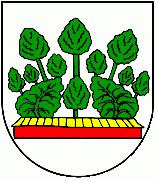 Erb obce Radvan nad Laborcom